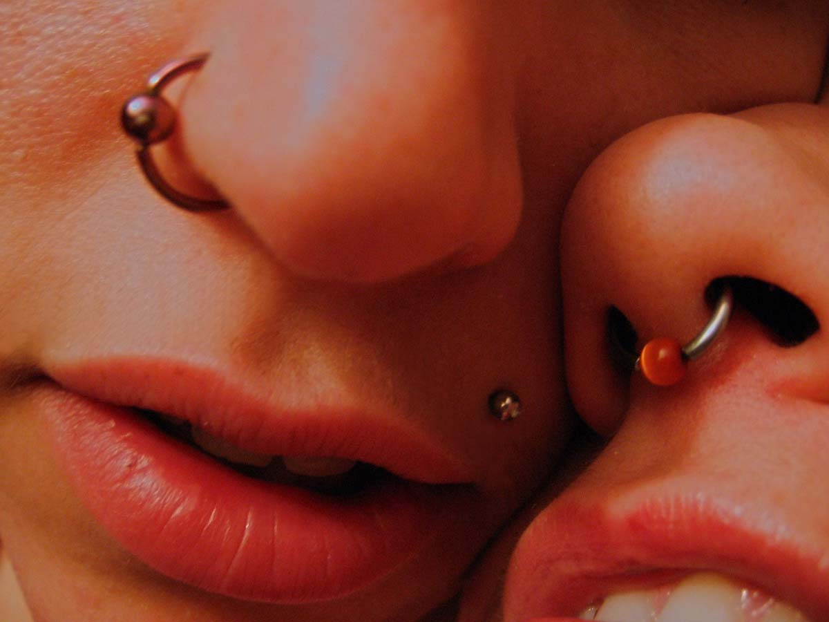 nose piercings